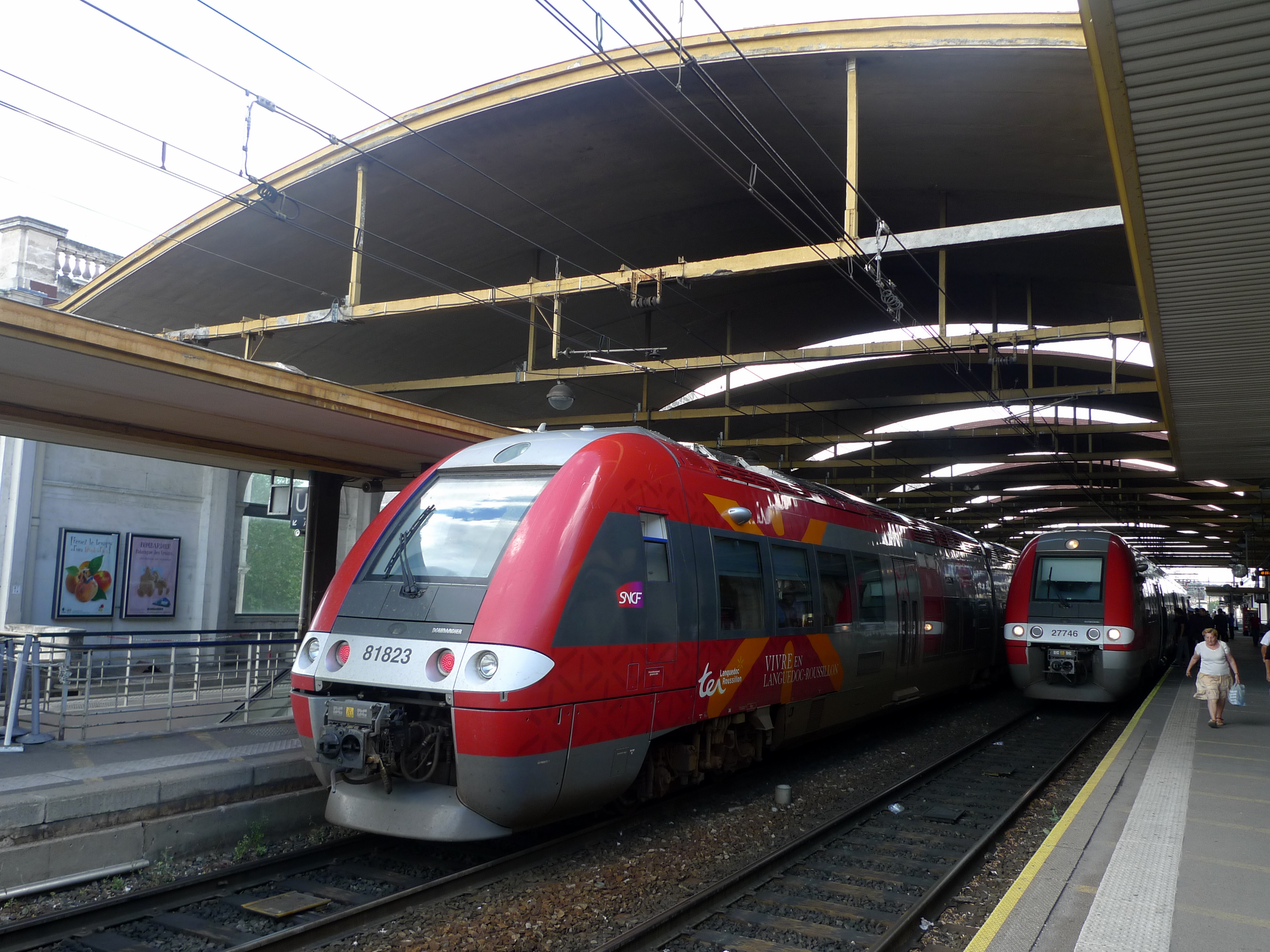 gare SNCF (Nîmes, FR30)